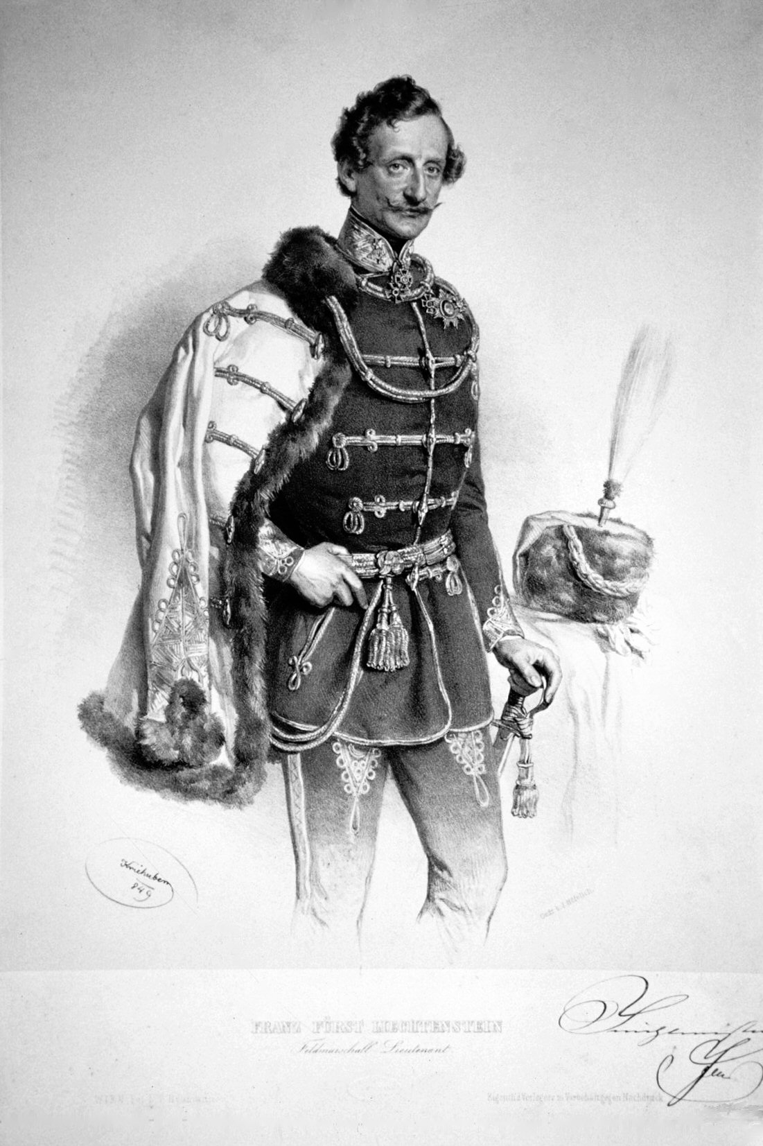 Franz de Paula Joachim Prinz von und zu Liechtenstein (1802-1887, als Feldmarschallleutnant, in Husarenuniform. Lithographie von Josef Kriehuber, 1849